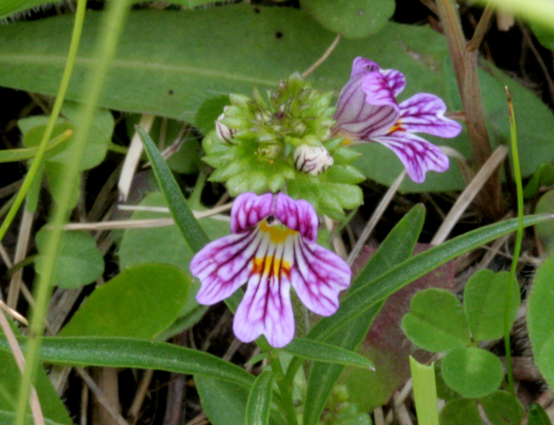 Eufrasia delle Alpi - Località : Cortina (BL), 1400 m s.l.m.